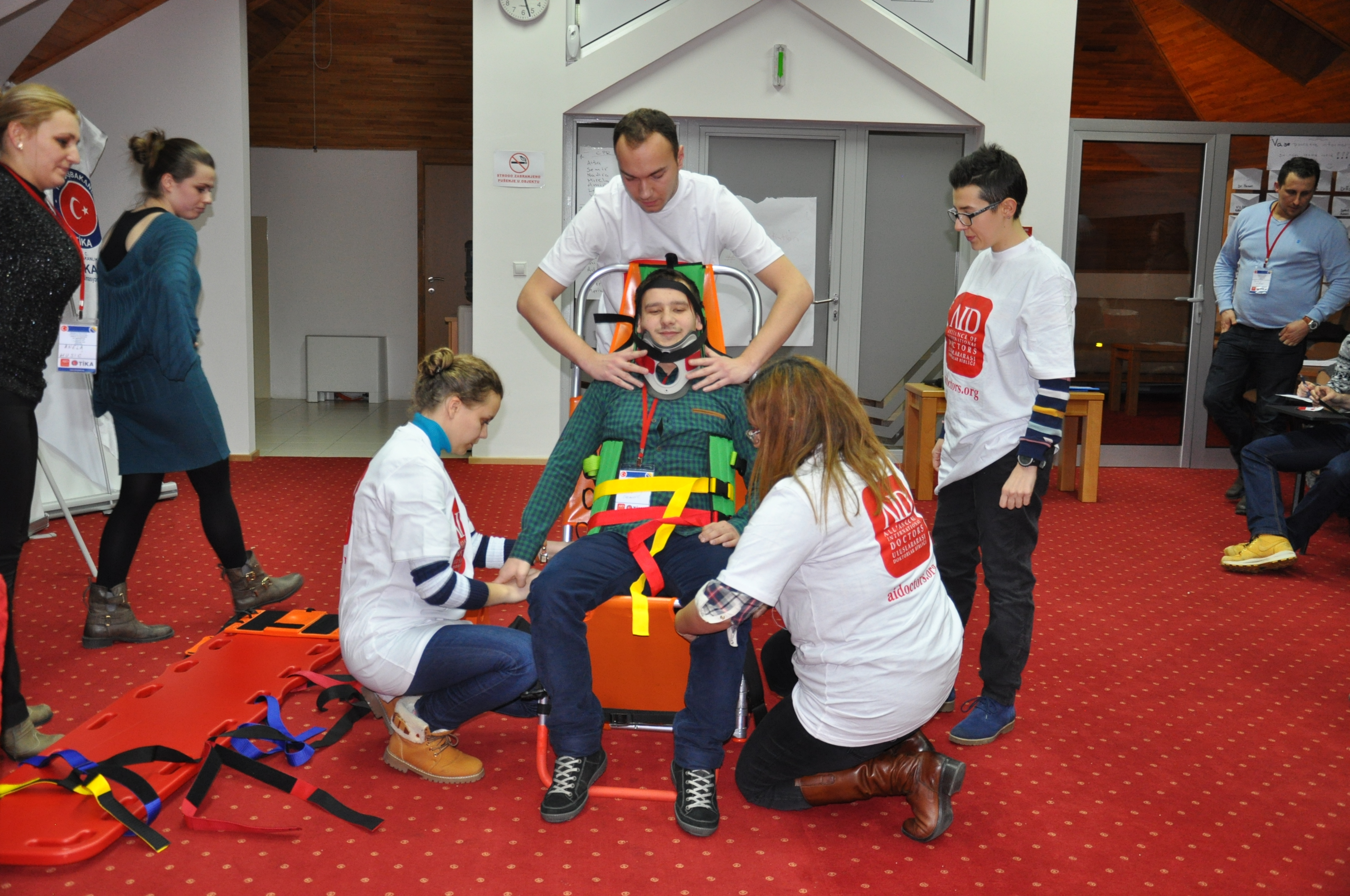 Bosna Hersek'te tıp fakültesi öğrencilerine yönelik seminerde afet ve acil durumlarla ilgili eğitim verildi.